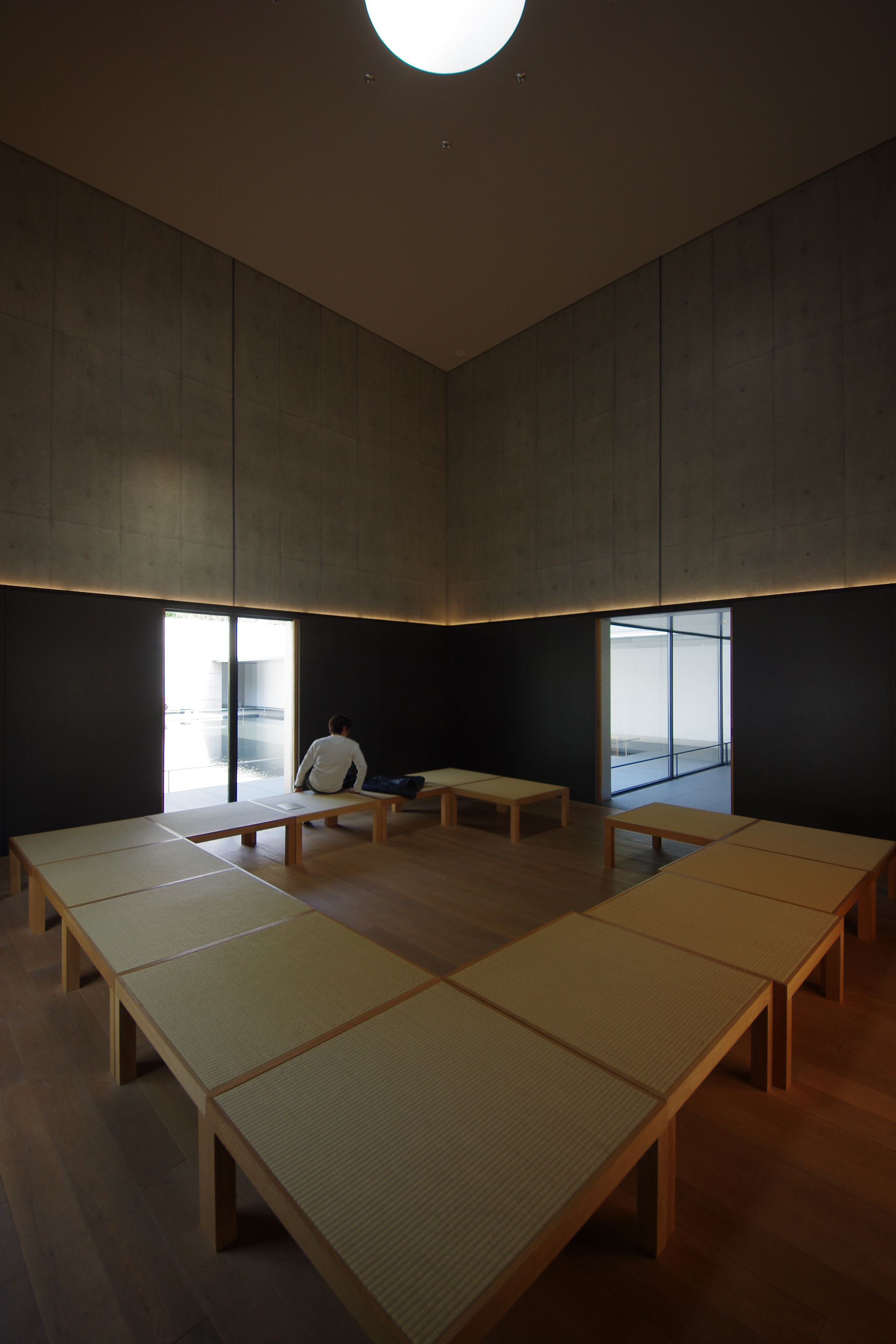 石川県金沢市、鈴木大拙館思索空間。谷口吉生設計